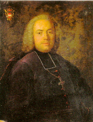 Portrait de Pierre-Joseph de Lastic, évêque de Rieux